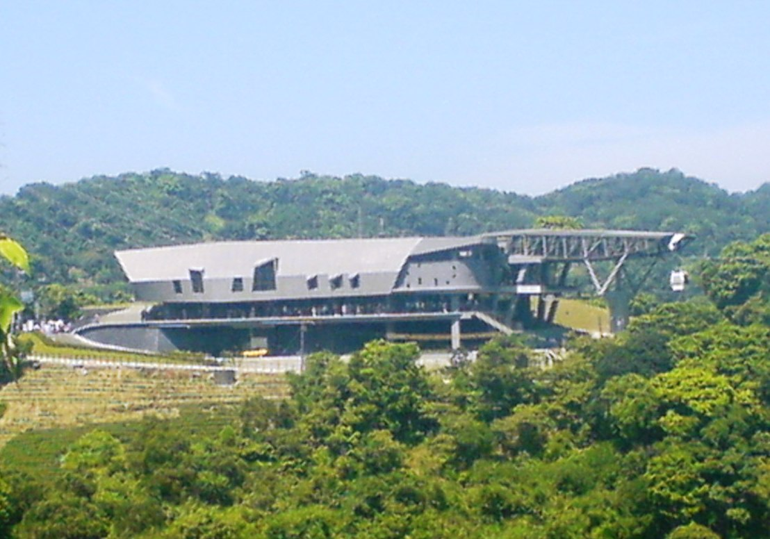 貓空纜車貓空站外觀。